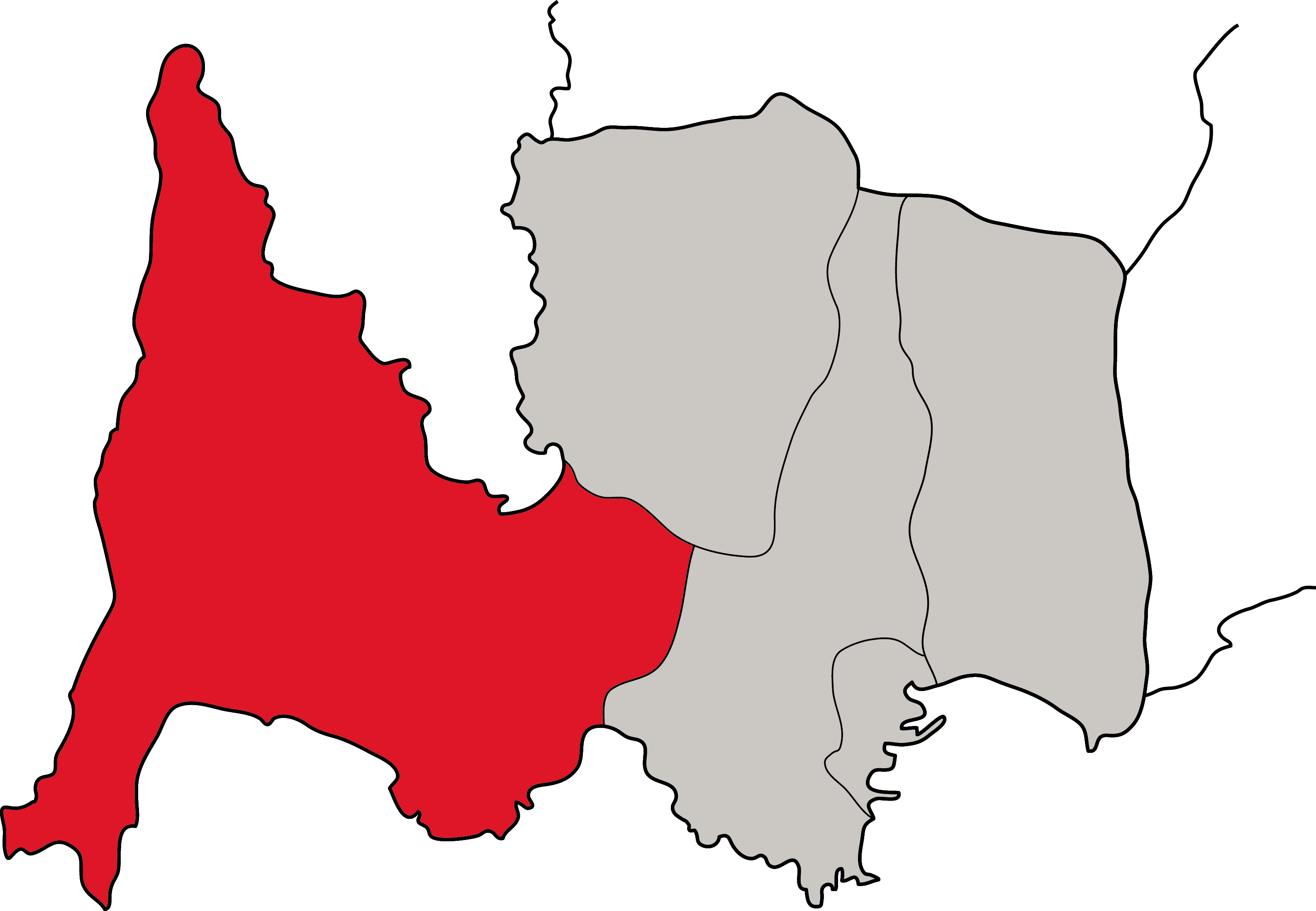 Localizacion da parroquia do Hío no concello de Cangas.